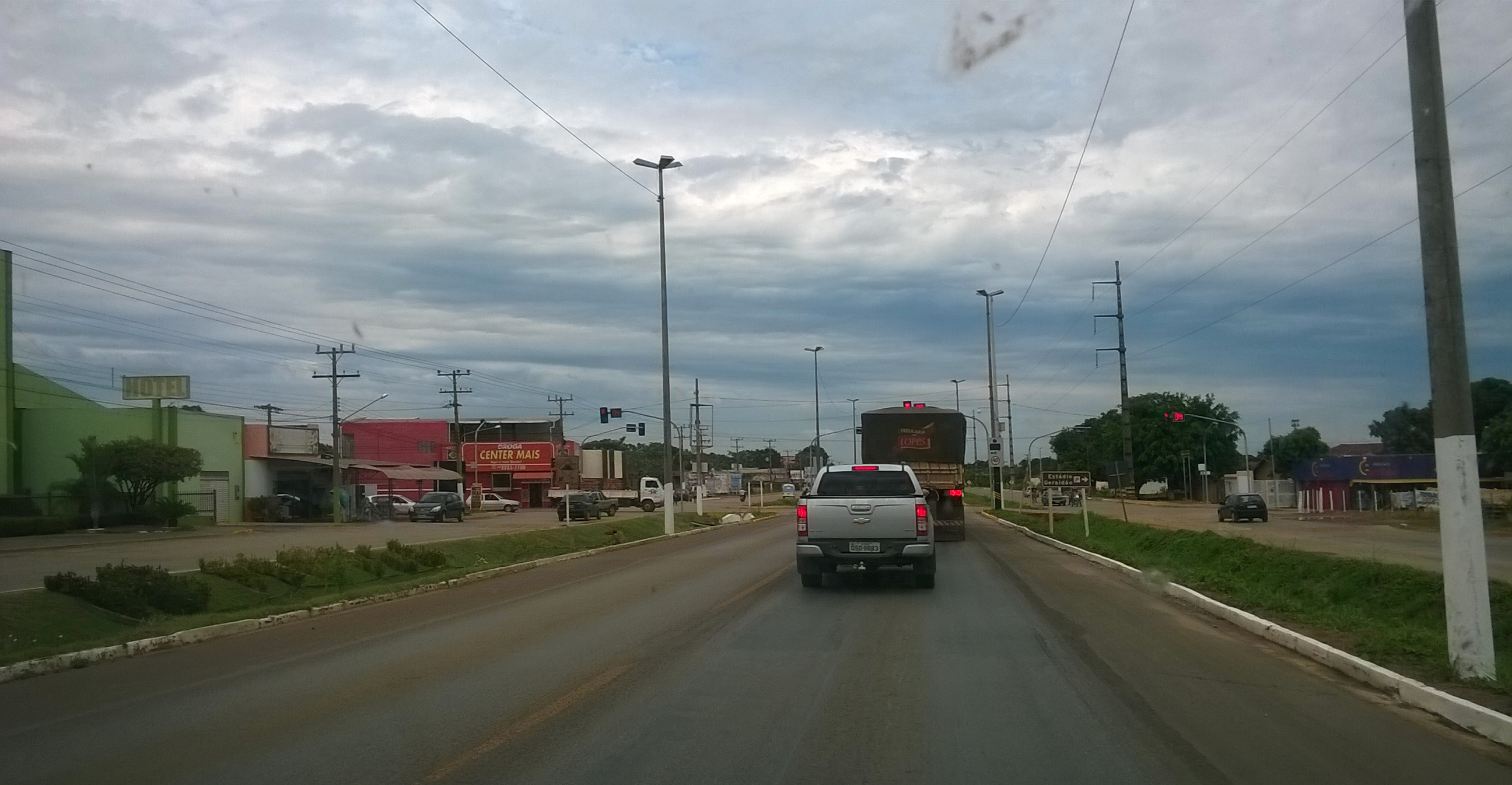 SOUTHWEST ROUTE.Federal Route BR-070, Cáceres, Mato Grosso state, Brazil.